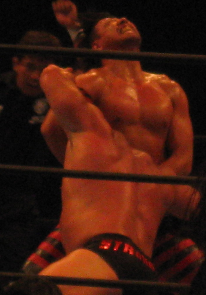 2011年8月7日 大阪府立体育会館 「G1 CLIMAX」 フロントネックロックを極める中邑真輔